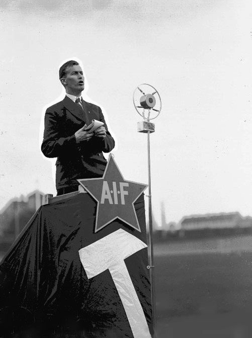 talerstol, Arbeidernes Idrettsforening, mann, taler, talerstol med symbolener (Arbeidernes Idrettsforbund og Det Norske Arbeiderparti).